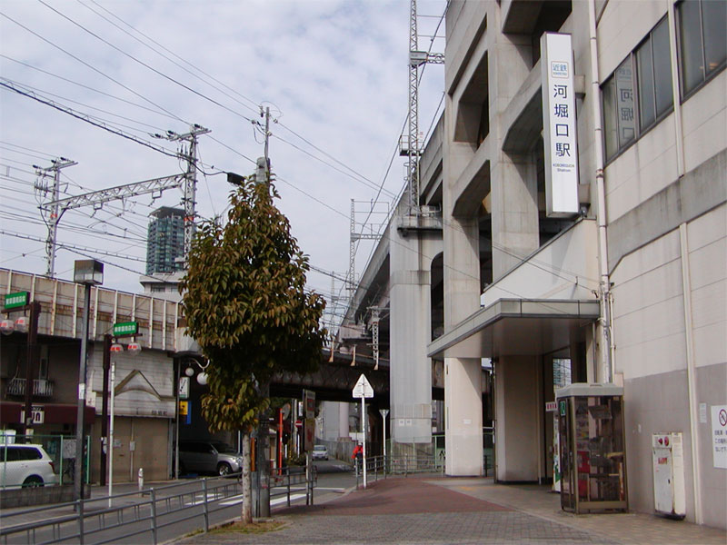 近鉄南大阪線 河堀口駅（大阪市阿倍野区天王寺町南2丁目）。